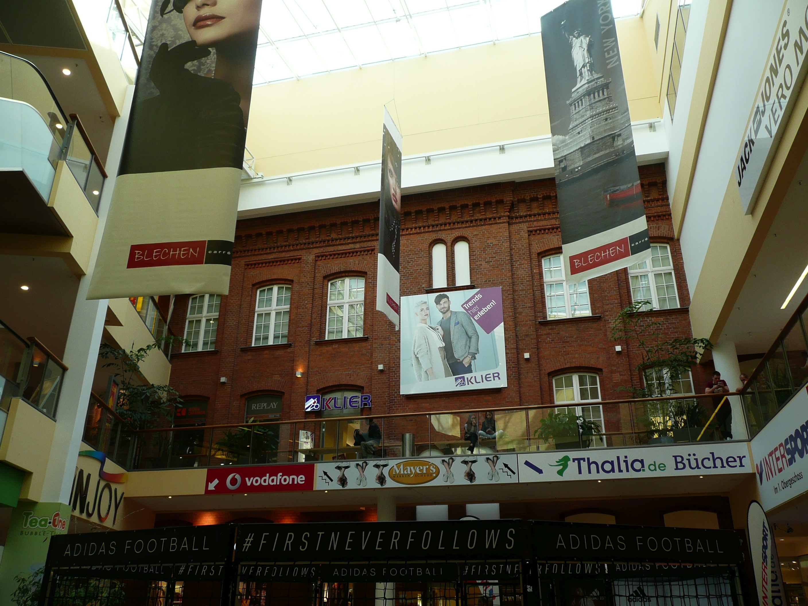 Innenansicht der ins Center integrierten Carl Blechen-Grundschule